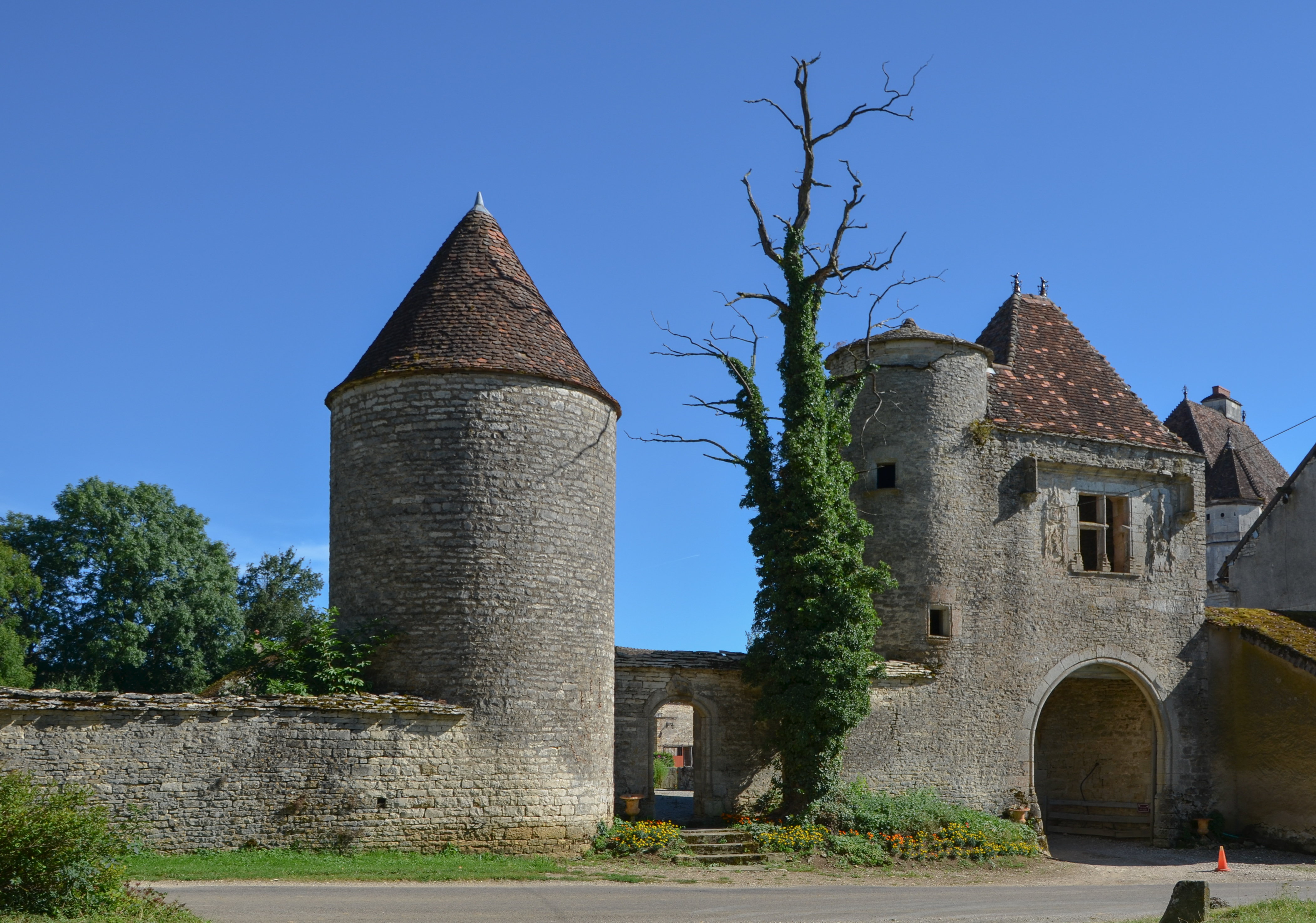 Château de Rosières à Saint-Seine-sur-Vingeanne, Côte d'Or, Bourgogne, France